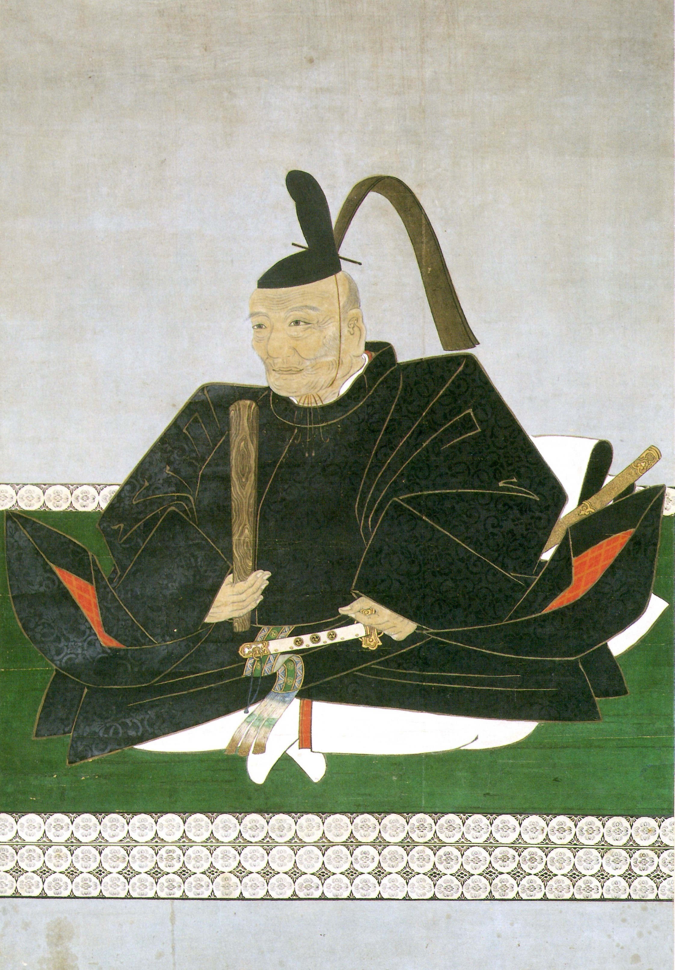 板倉勝重の肖像。